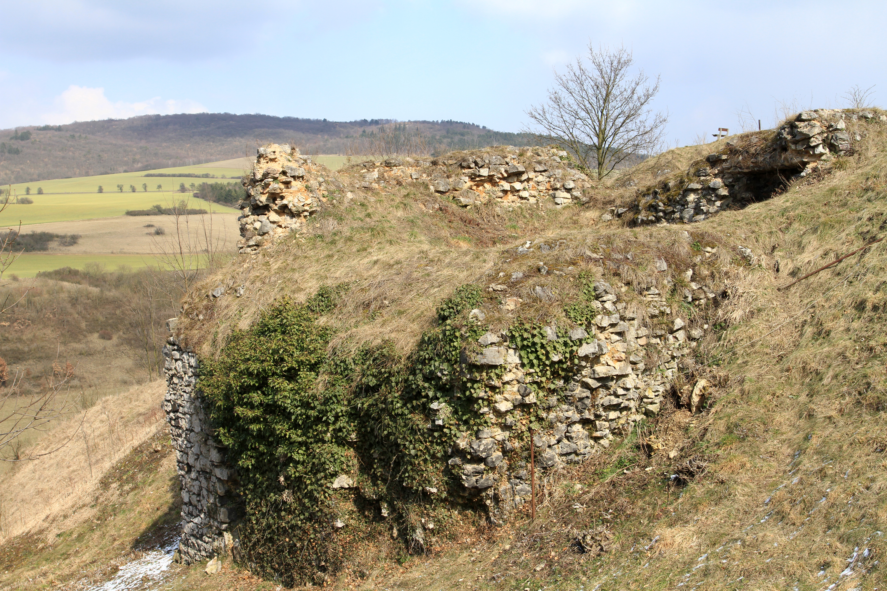 Výšinné opevněné sídliště - hradiště, archeologické stopy (Tetín), Tetín